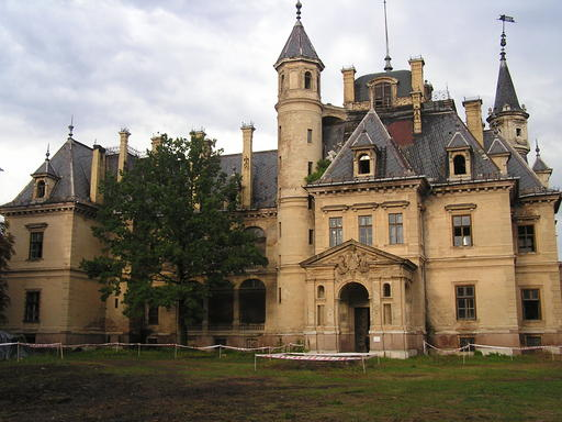 Schossberger-kastély Tura Hungary